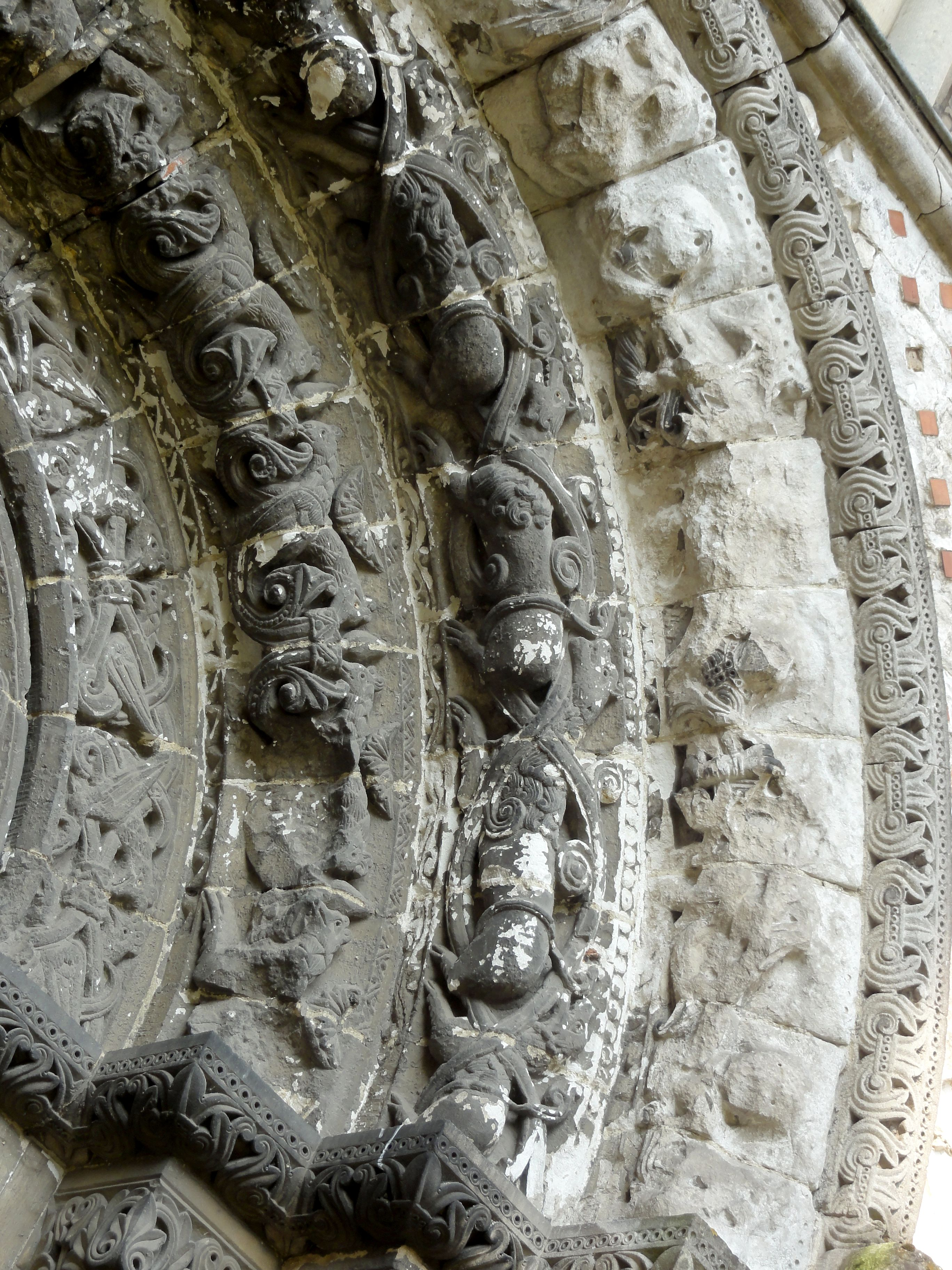 Portail nord, détail des archivoltes.